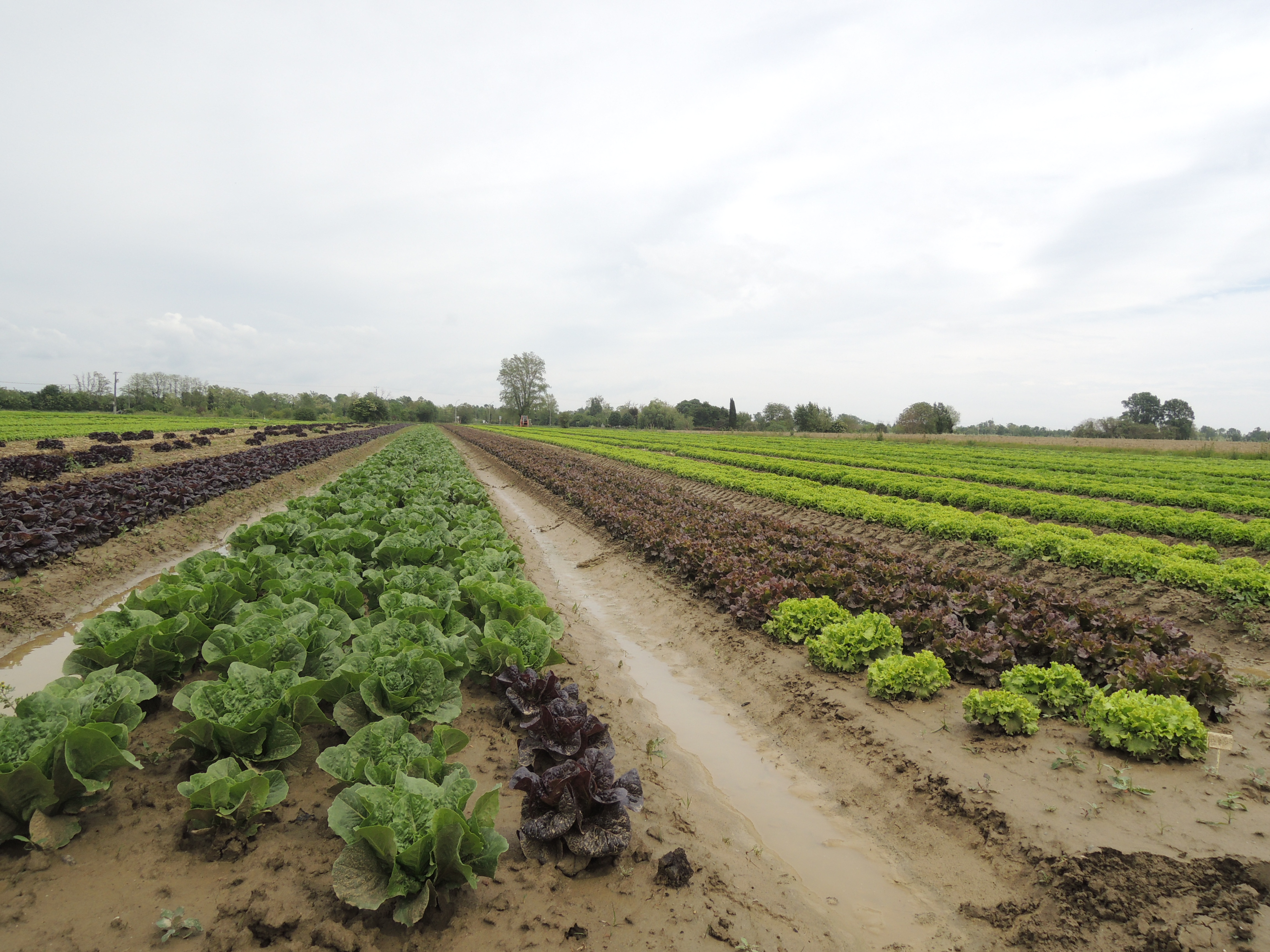 Zone urbaine potentiellement inondable consacrée au maraichage.